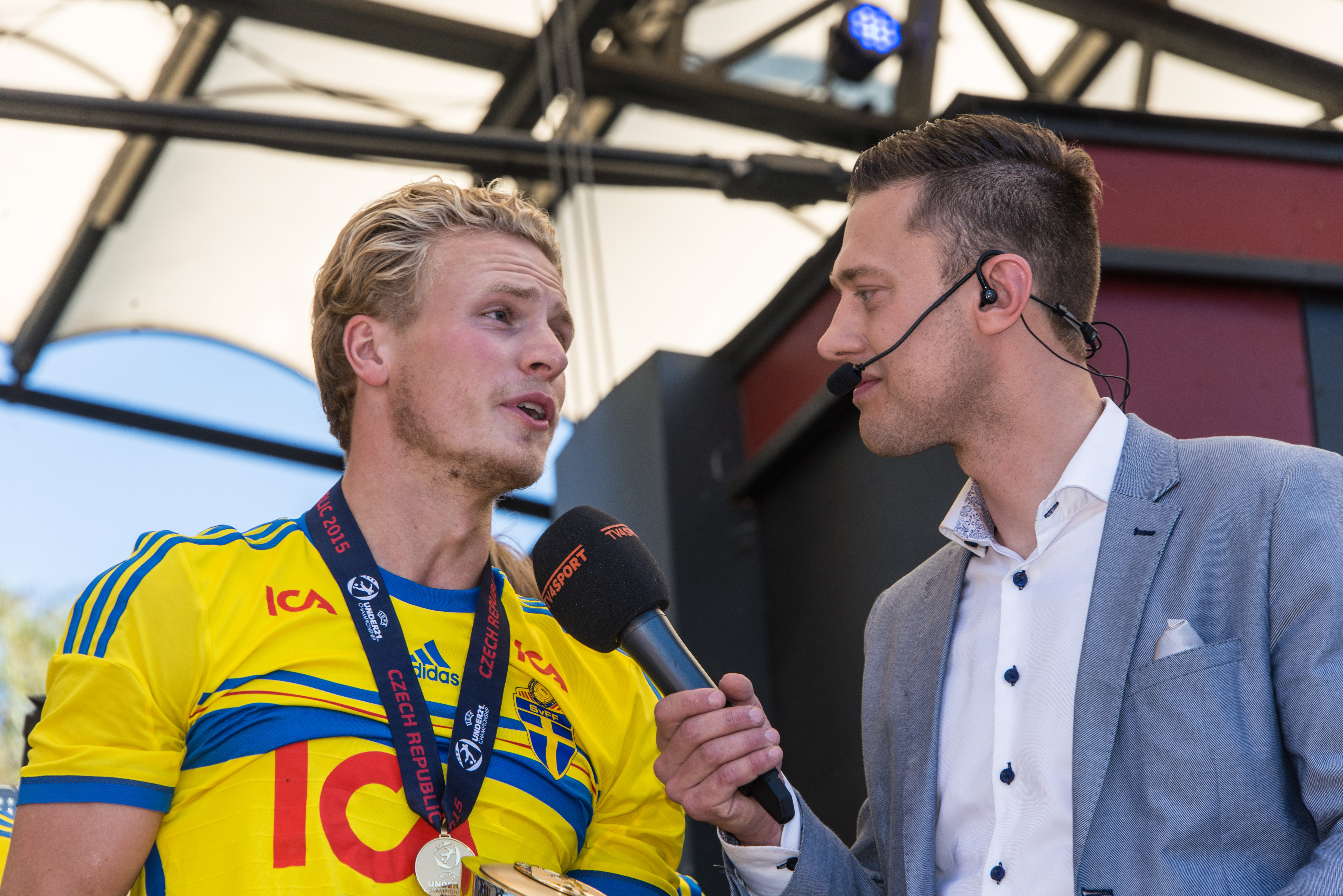 Sveriges U21-landslag blir hyllade i Kungsträdgården i Stockholm den 1 juli av 1000-tals fans efter guldet i U21-Europamästerskapet i fotboll 2015.